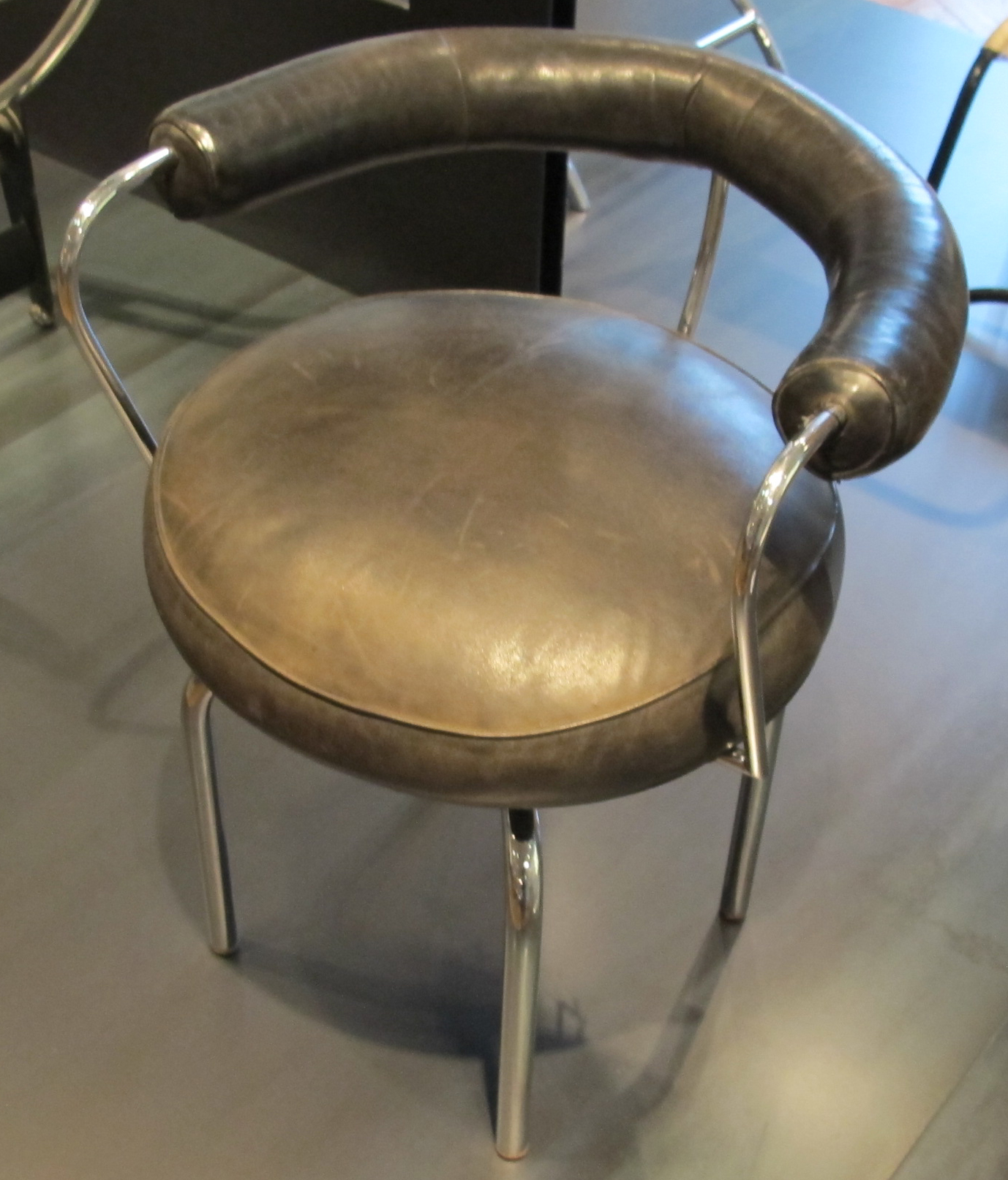 Charlotte perriand, sedile ruotante, parigi 1927